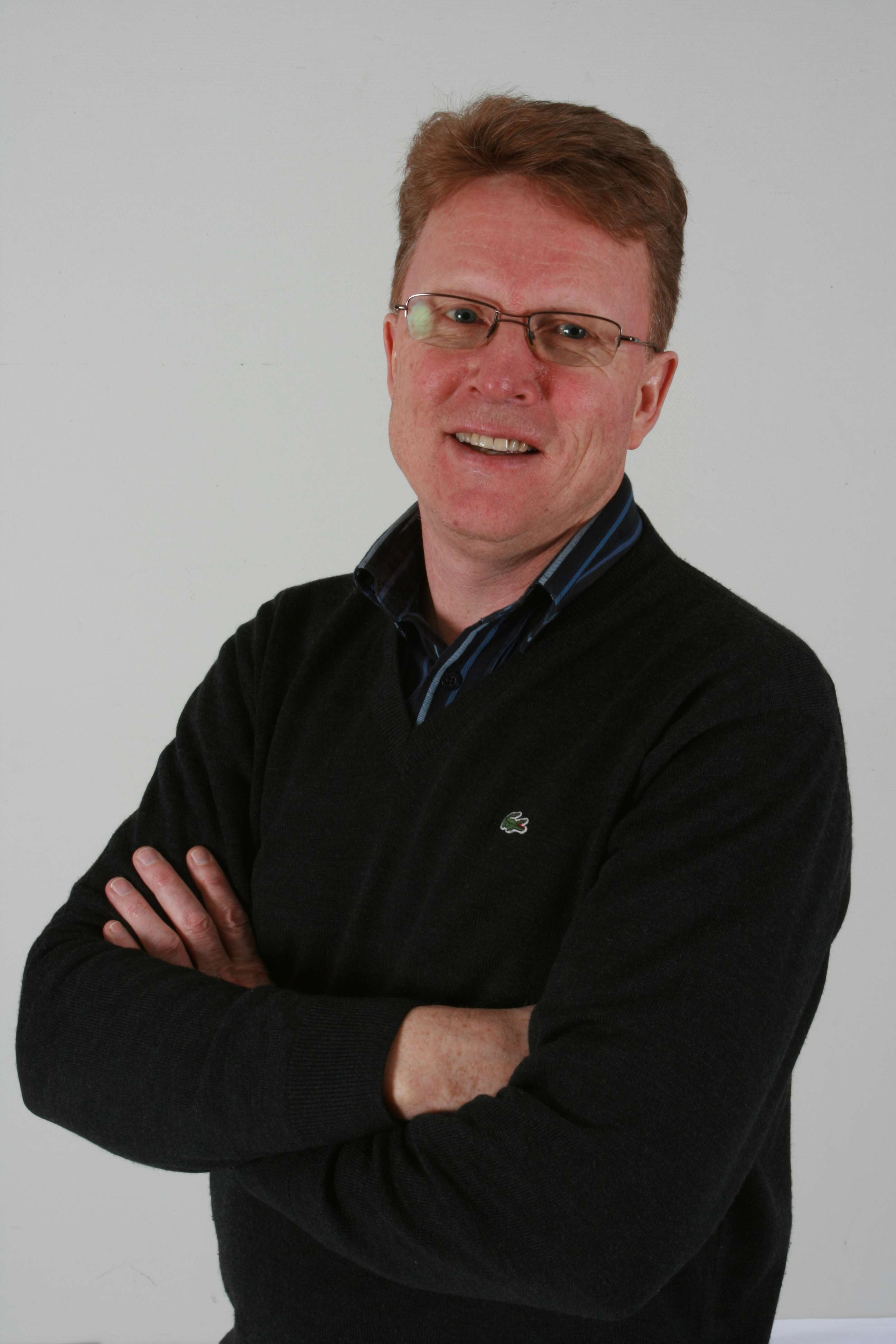 Oskar Grimstad valgkampbilder for Stortingsvalgkampen 2009